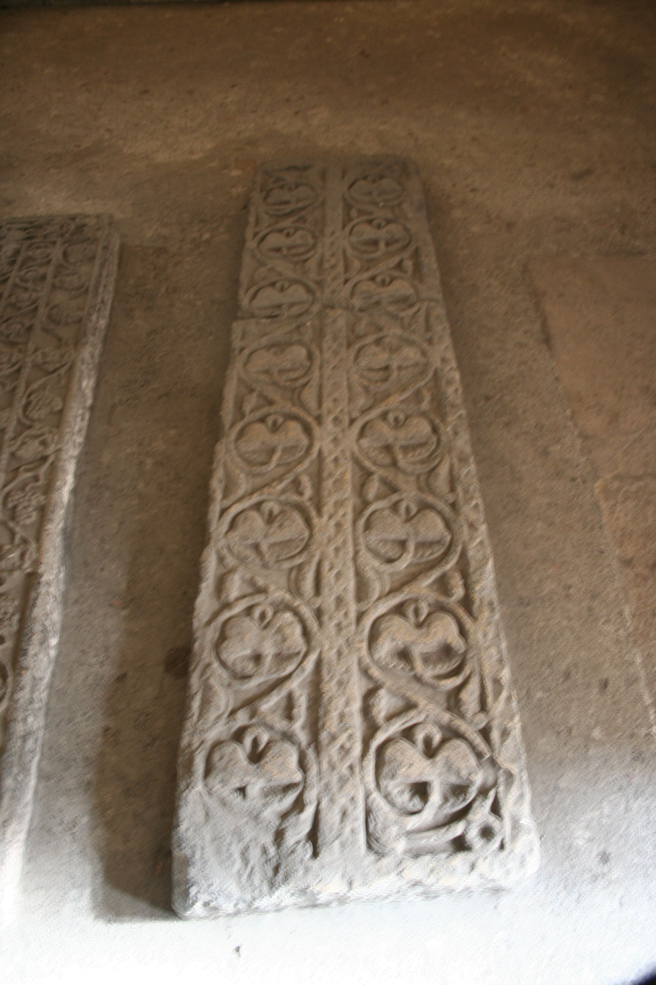 Lauda central funeraria de la cripta de Santa Leocadia en la catedral de Oviedo